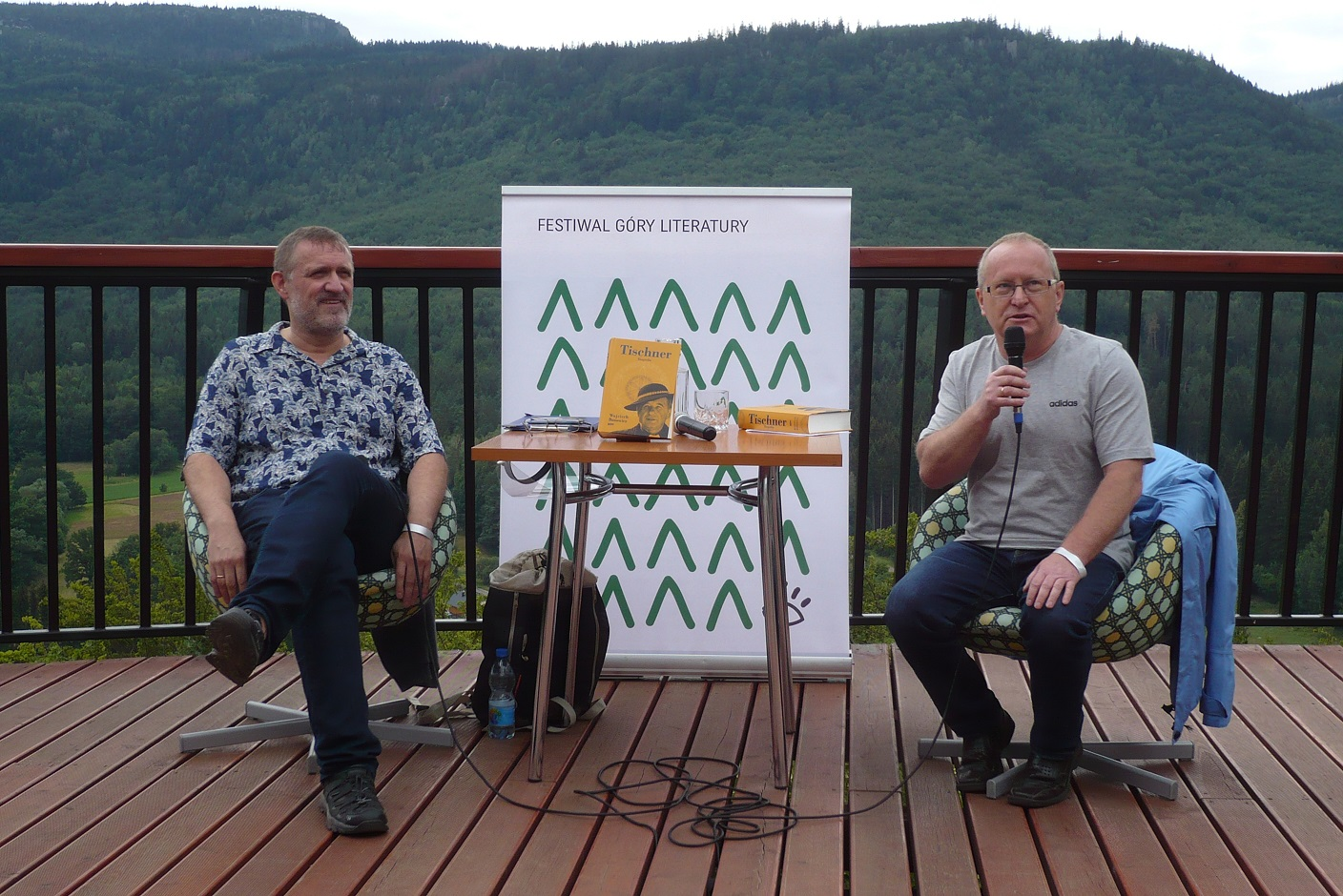 Wojciech Bonowicz i Karol Maliszewski, VI Festiwal Góry Literatury, Radków, taras na Górze Guzowatej, 15.07.2020